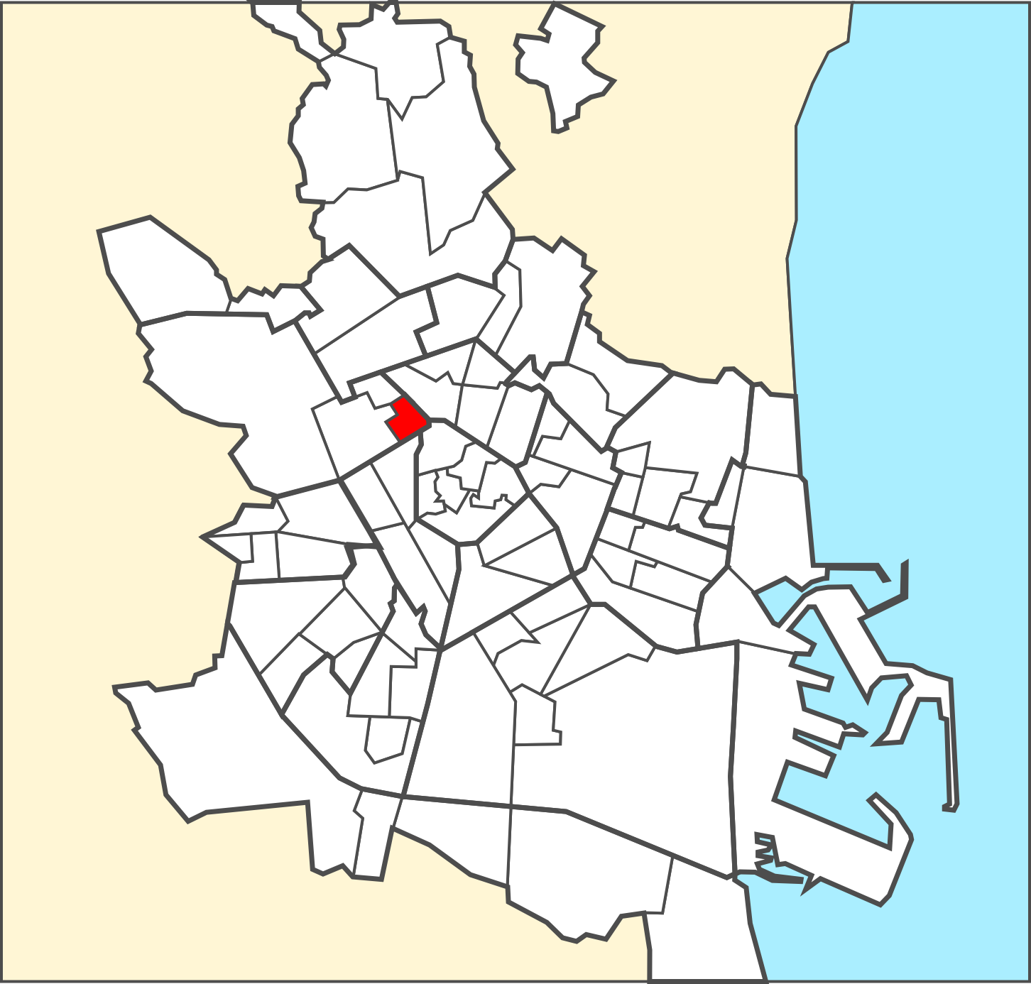 Localització del barri dins de la ciutat de València.